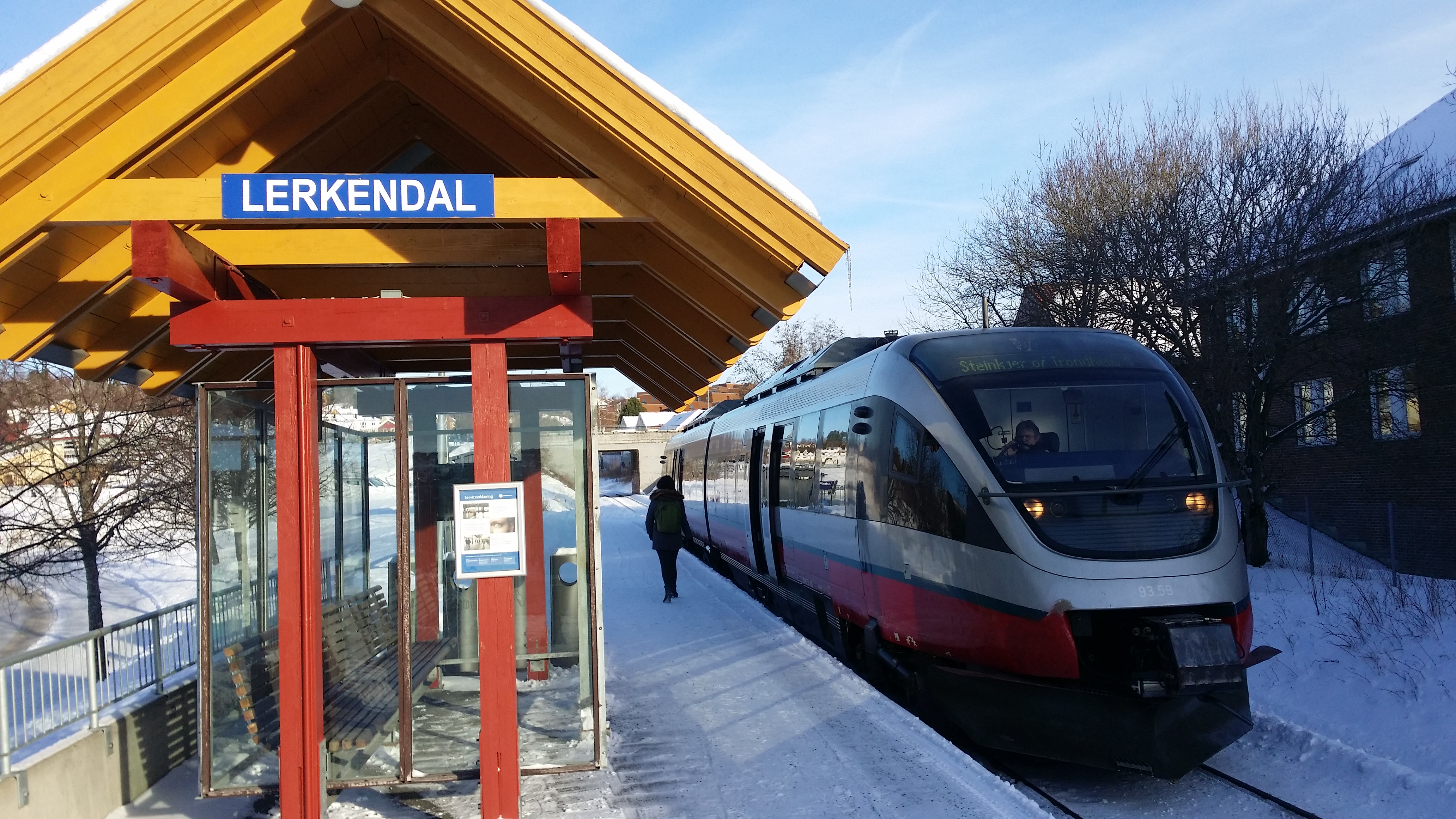 Lokaltog avventer avgangstiden ved Lerkendal holdeplass.